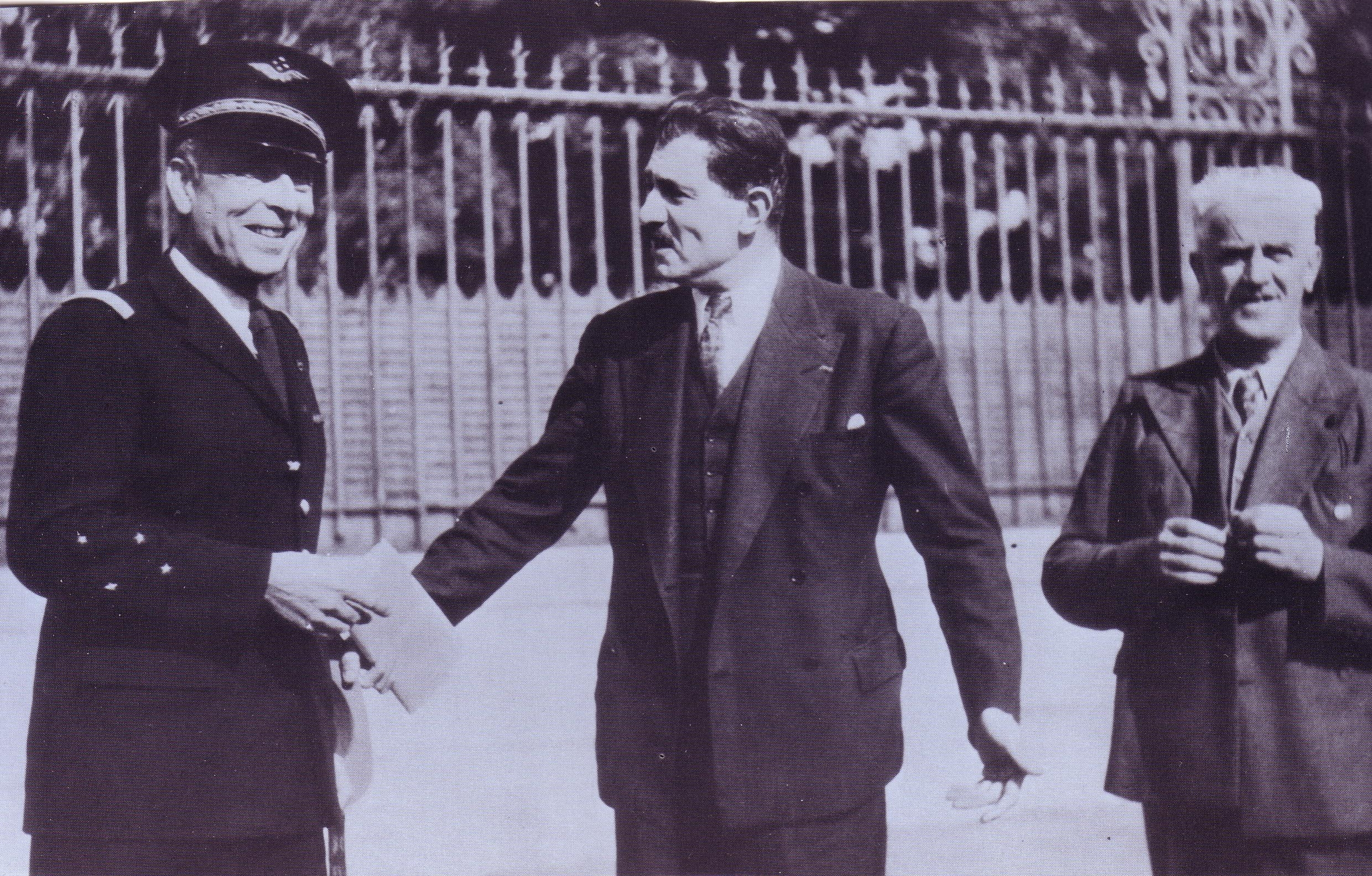 De gauche à droite : le général François d'Astier de la Vigerie, originaire de Villedieu-sur-Indre, Max Hymans et André Parpais, secrétaire fédéral de la S.F.I.O. Retrouvailles devant les grilles de la préfecture, à Châteauroux, Indre.